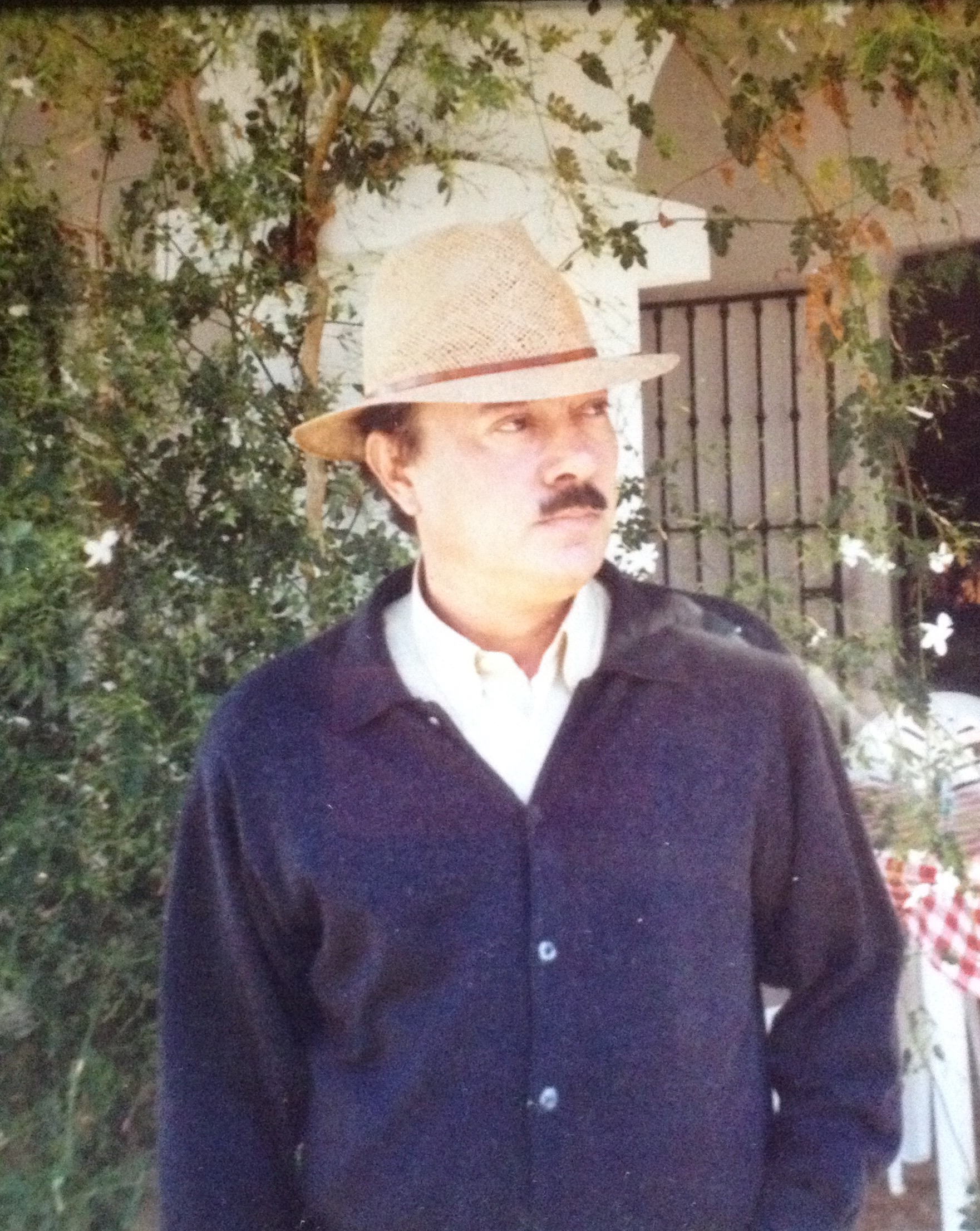 Antonio Caro disfrutando del mundo rural.